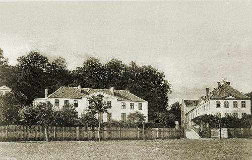 Dwór III, Gdańsk-Oliwa.